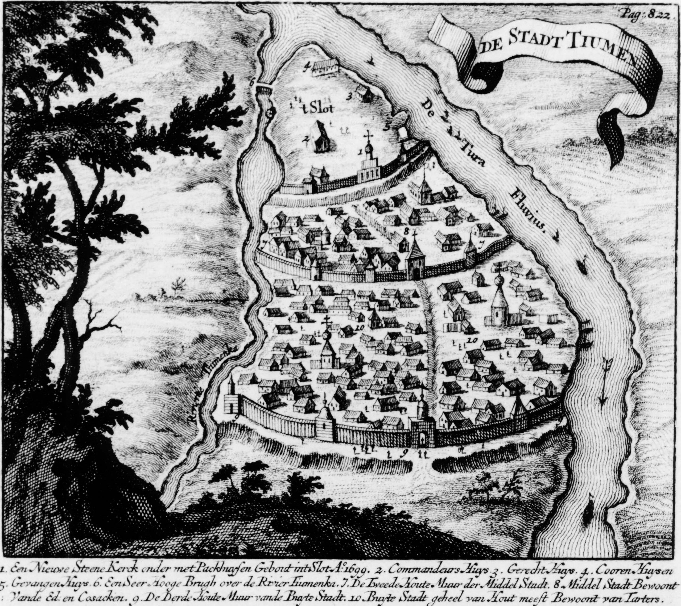 Гравюра с изображением Тюмени XVII века из книги Н. К. Витсена "Северная и Восточная Тартария" издания 1785 года